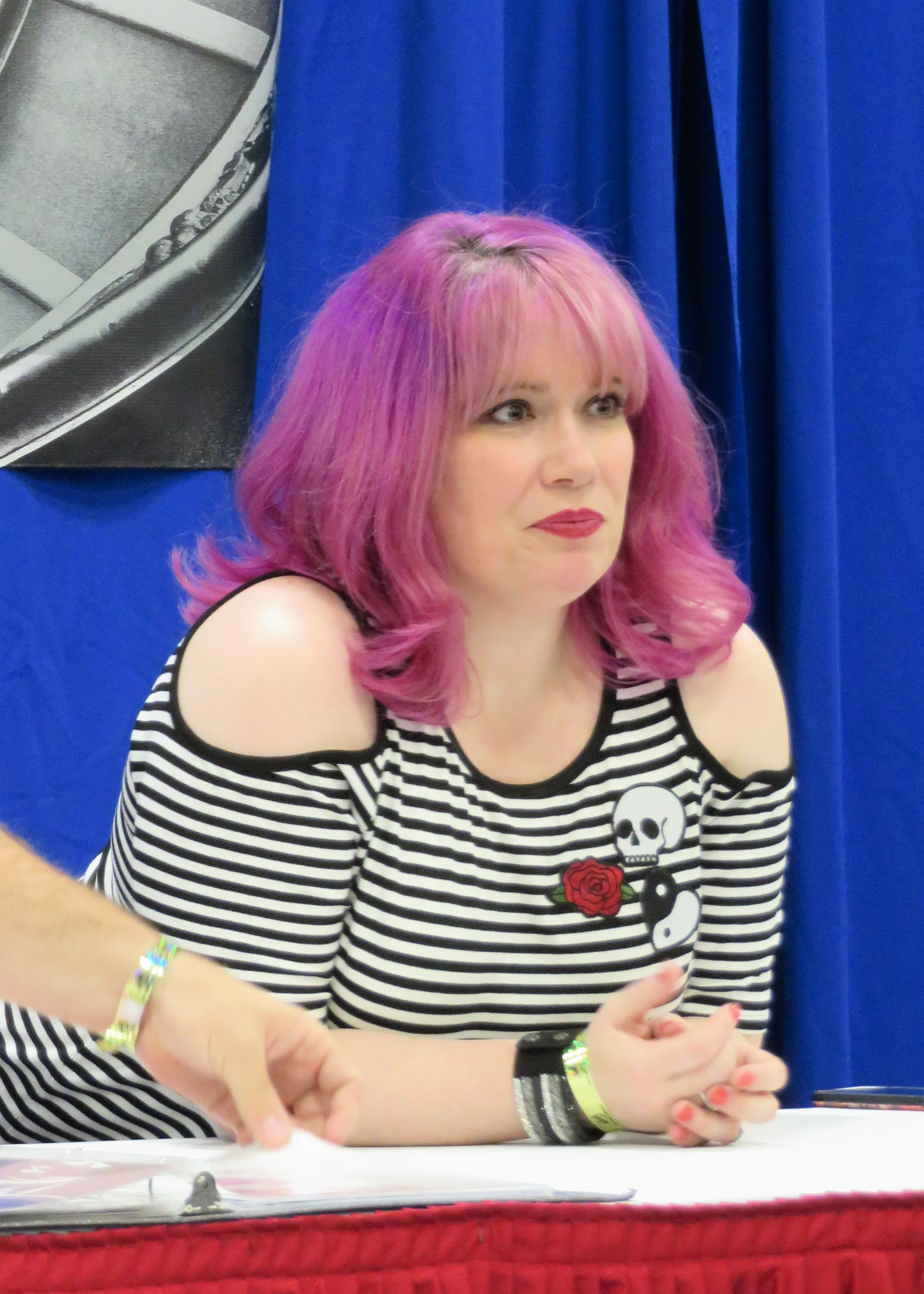 Monica Rial